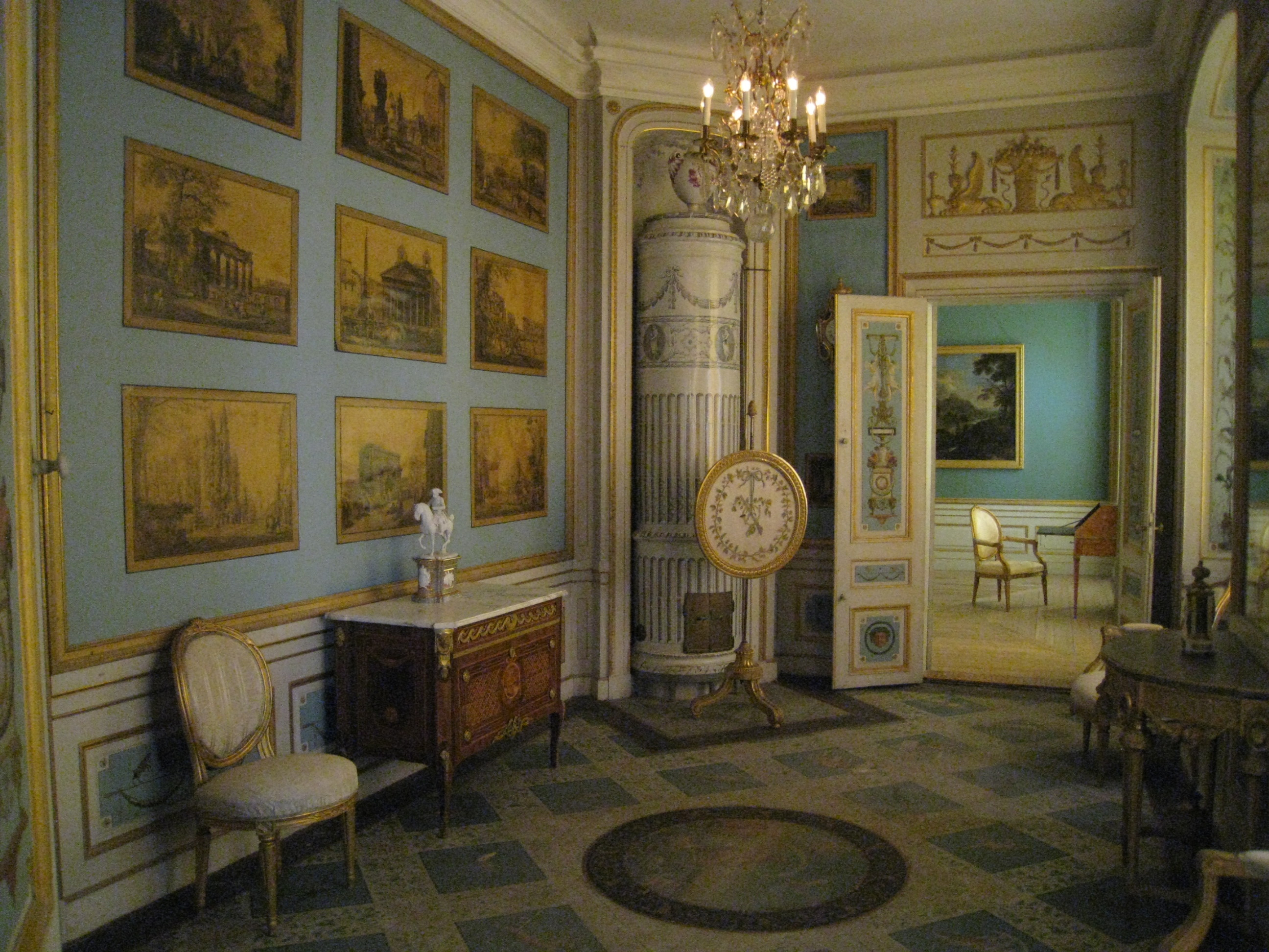 Tullgarns slott, blå kabinettet, Gälöfjärden, Trosa skärgård, Hölö, Södertälje kommun, Södermanland. I Blå kabinettet har prins Fredrik Adolf klistrat upp bilder på väggarna med gravyrer med romerska motiv av Volpato och Ducros. Det vackra blå rummet inreddes år 1800 av konstnären Anders Hultgren (1763-1838). Golvet är målat på väv. Byrån är signerad Georg Haupt 1780. På byrån står en ryttarstatyett av Fredrik den store (Fredrik Adolfs morbror). Fönstersmygarnas dekor med svenska fåglar är utförd efter förebilder av Rafaels Loggior i Vatikanen. Eldskärmen är broderad av prinsessan Sofia Albertina.